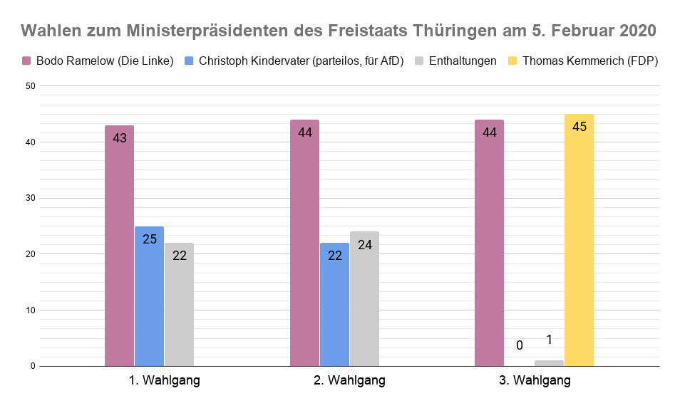 Diagramm zur Wahl des Ministerpräsidenten von Thüringen am 5.2.2020